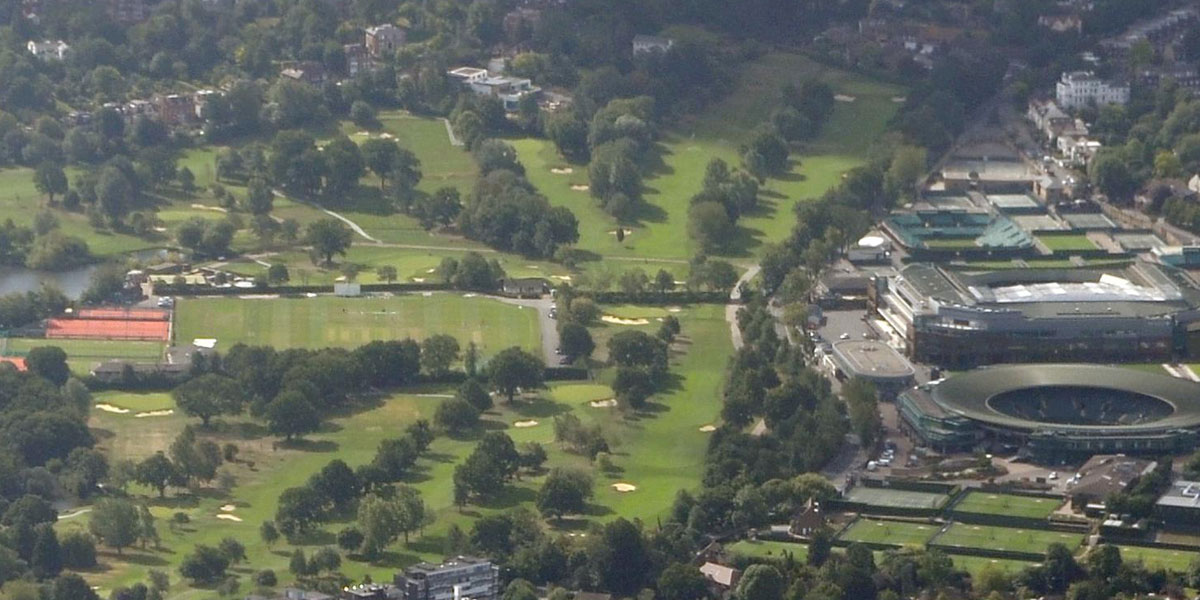 Ausschnitt aus wikimedia commons „File:Cmglee London Wimbledon aerial.jpg“